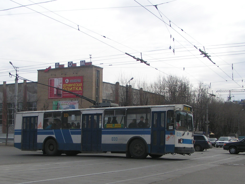 Смоленск. Троллейбус ЗиУ-682.